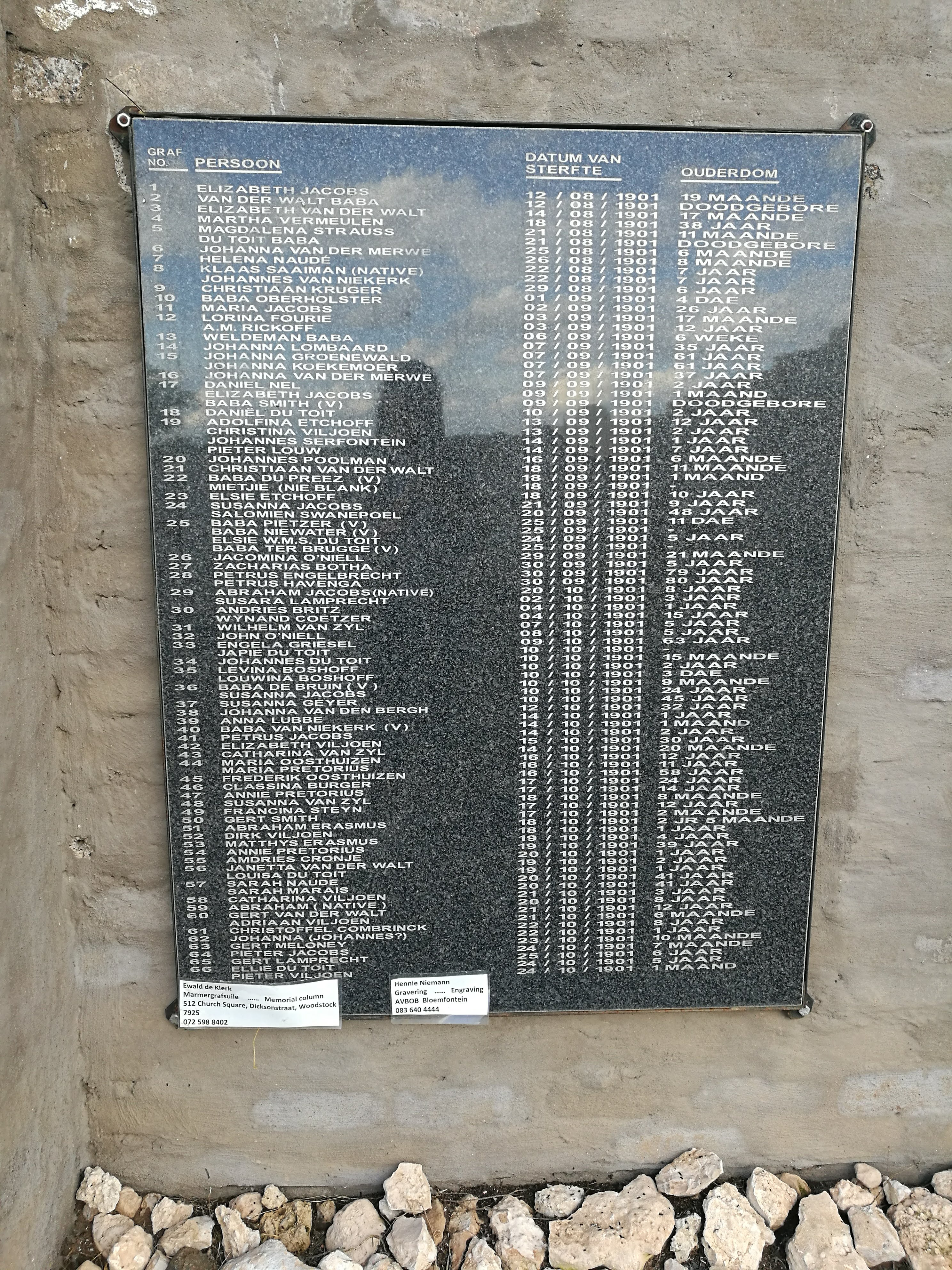 Granietpaneel met name van slagoffers